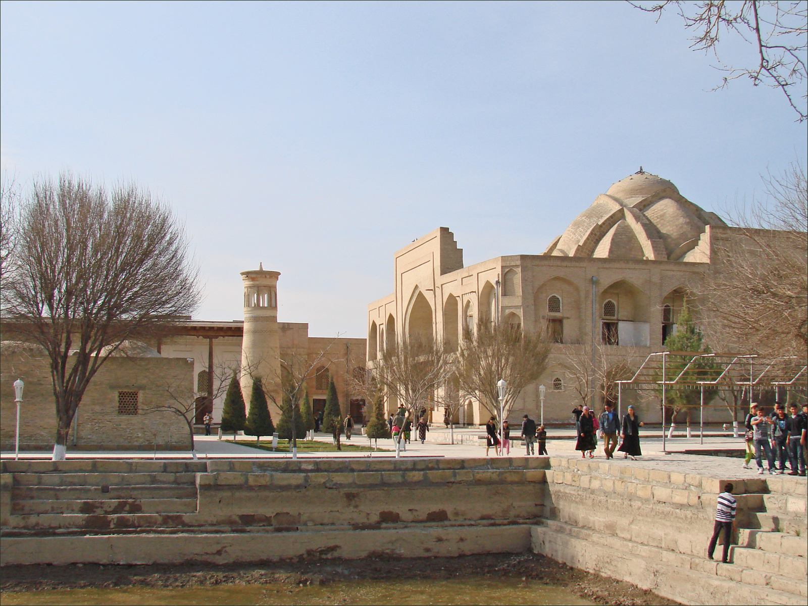 L'ensemble architectural autour du tombeau de Bakhaouddin Nakhchbandi (1318-1389) est, depuis cinq siècles, un des lieux majeurs de pélerinage pour les musulmans. Trois Hadj sur le tombeau de ce saint de l'Islam soufique, sont équivalents à un pélerinage à La Mecque. Bakhaouddin Nakhchbandi est le fondateur de l'ordre soufi des Nakhchbandi, le plus répandu en Asie centrale. L'ensemble comprend un grand bâtiment dans la cour duquel se trouve la tombe du saint, non visible, mais signalée par la hampe traditionnelle indiquant la tombe d'un saint de l'Islam. Des mosquées funèbres avec des iwans encerclent la cour. Ces bâtiments ont été rénovés dans les années 1990. L'ensemble comprend aussi une médersa, une nécropole, une khanaka,.. Le lieu, situé à 12 Km de Boukhara, attire de nombreux pélerins. Le rite est calqué sur celui de La Mecque. Les pélerins doivent faire plusieurs fois le tour du tombeau, embrasser certaines parties du mausolée,.. mais aussi tourner et passer sous l'arbre qui "aurait germé sur son bâton". Photo Annie Dalbéra